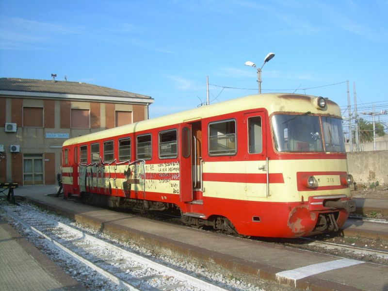 Littorina alla stazione di Gioia Tauro